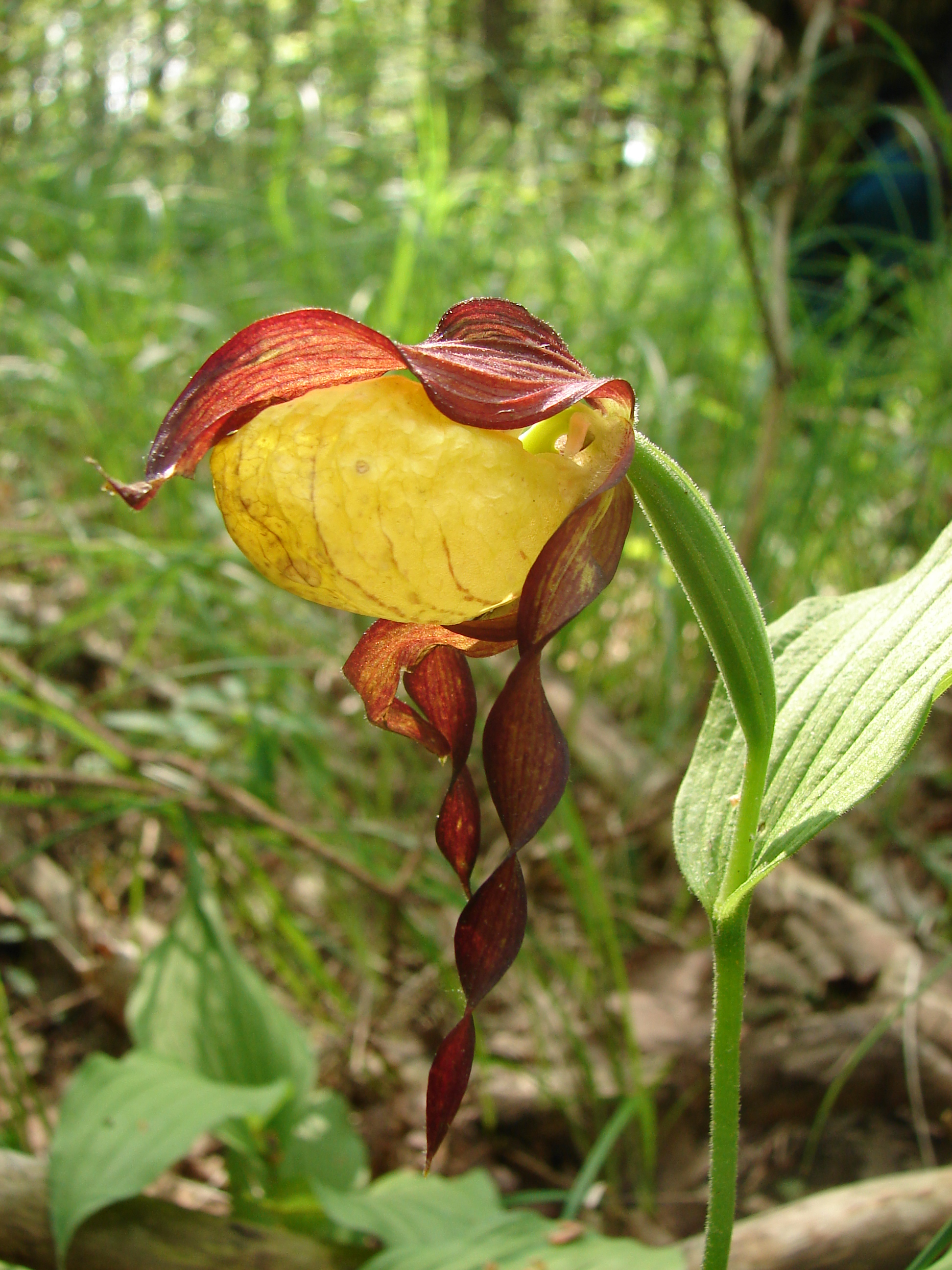 «Прип'ять-Стохід», Любешівський р-н, ДП «Любешівське ЛМГ», ДП СЛАП «Любешівагроліс», с/р